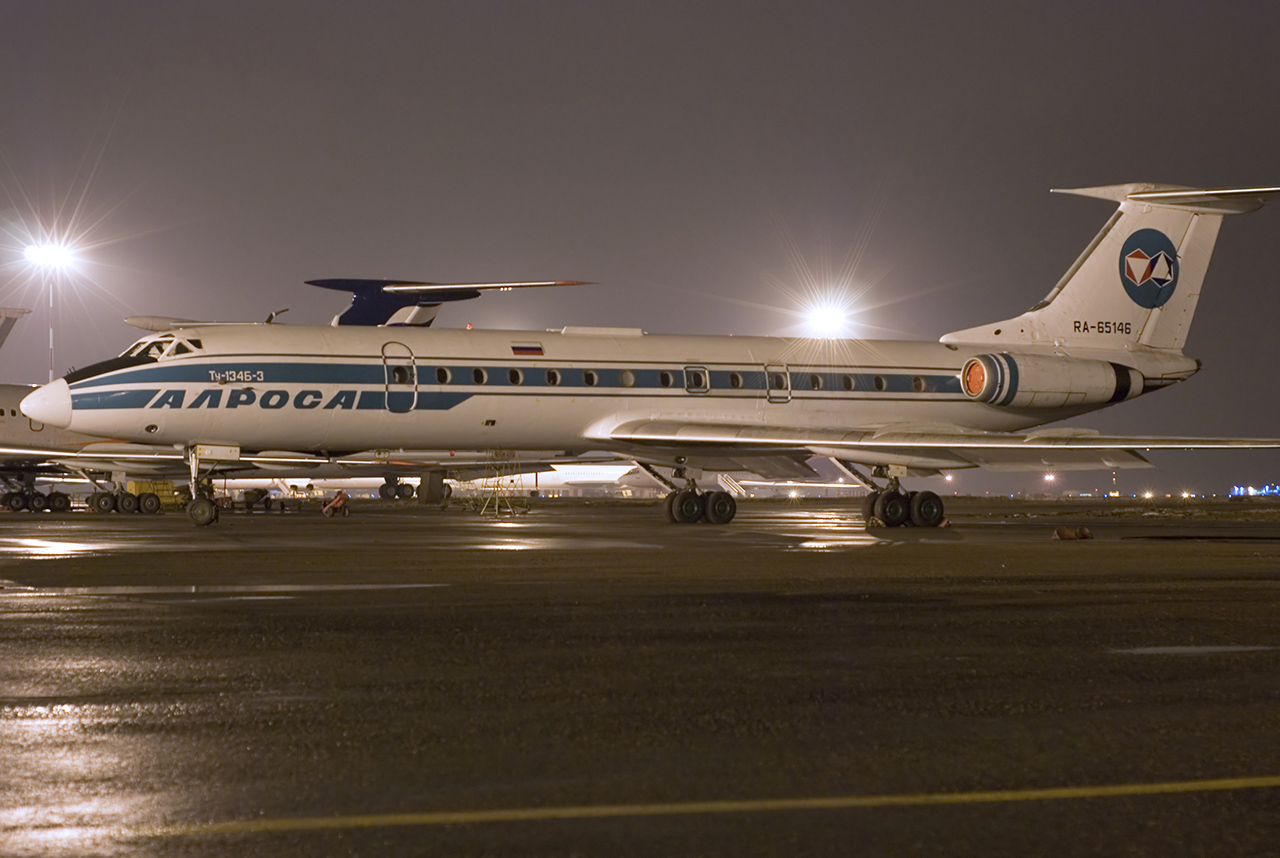 "Alrosa"TU-134 RA-65146